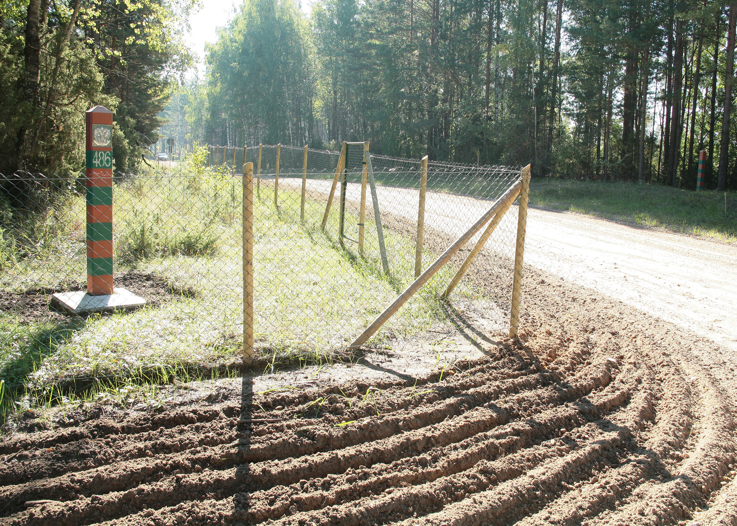 Saatse kordoni piirilõik